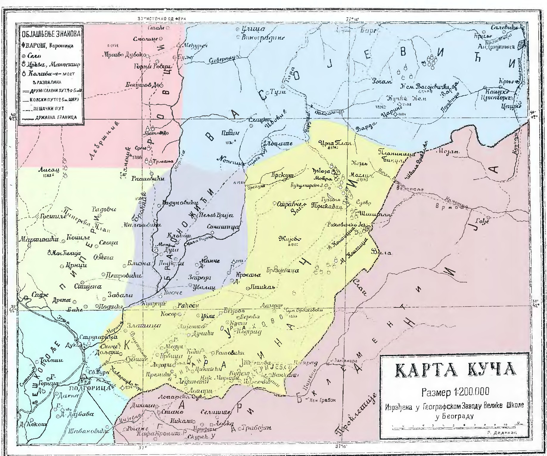 Карта Куча (Марко Миљанов, Племе Кучи у народној причи и пјесми) Титоград, 1967.г.